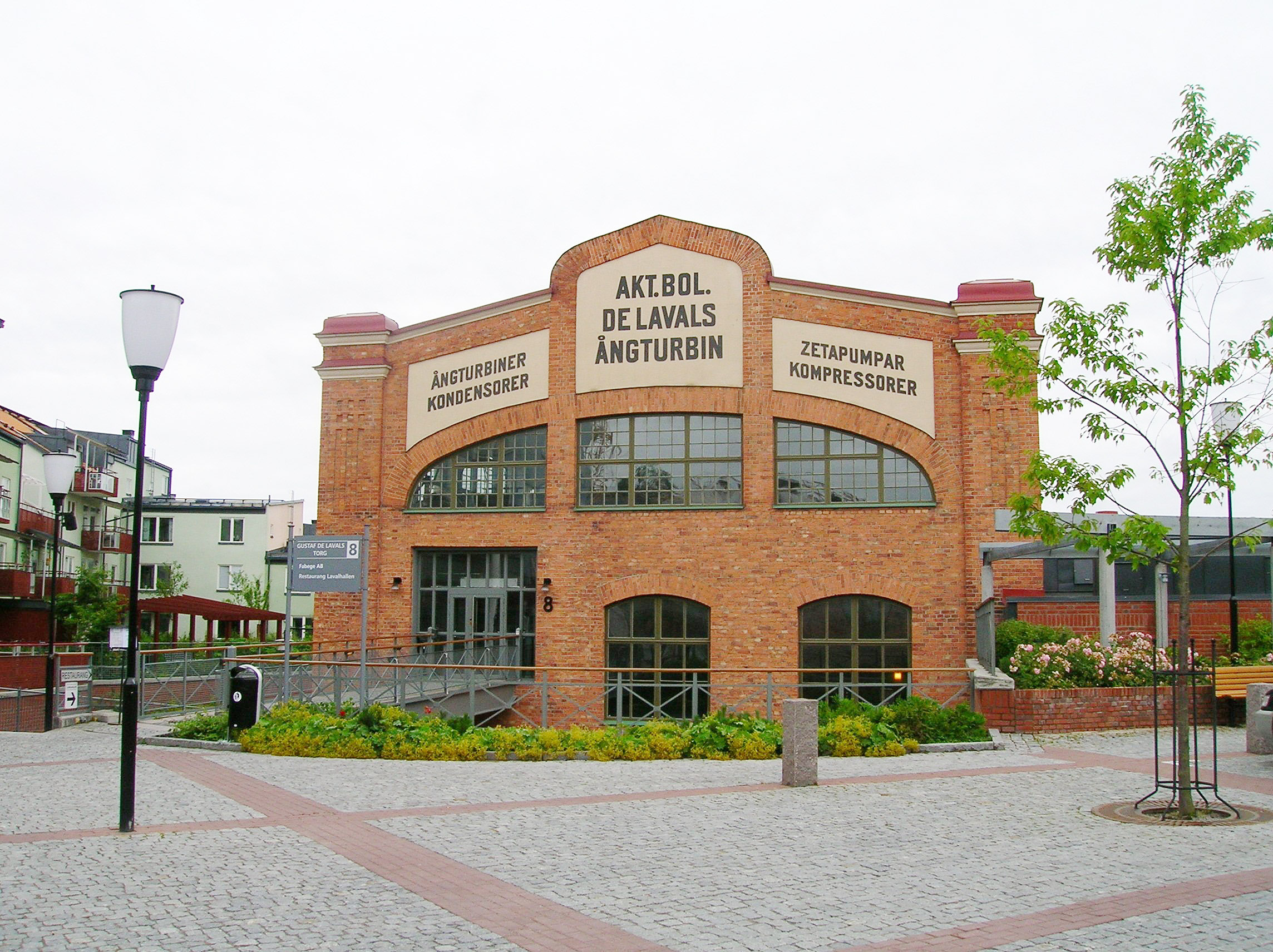 Gustav de Lavals f.d. ångturbinfabrik, Järla, Nacka, Sverige